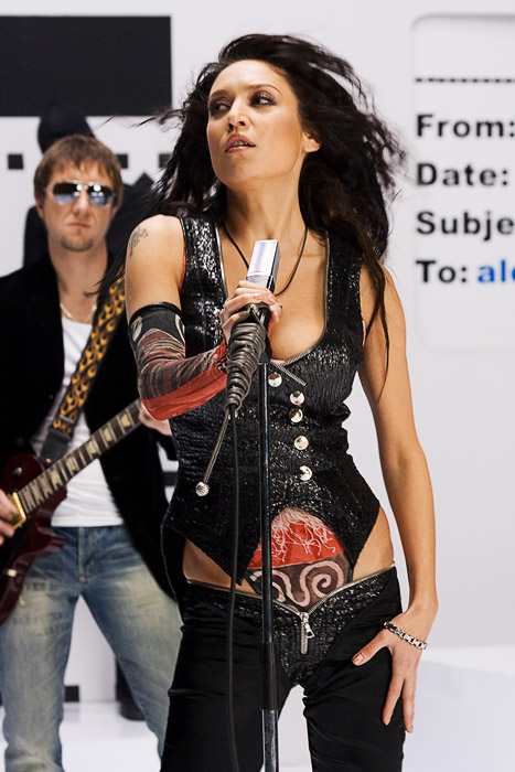 Alеna Vinnitskaya - a Ukrainian singer (ex-Nu Virgos)